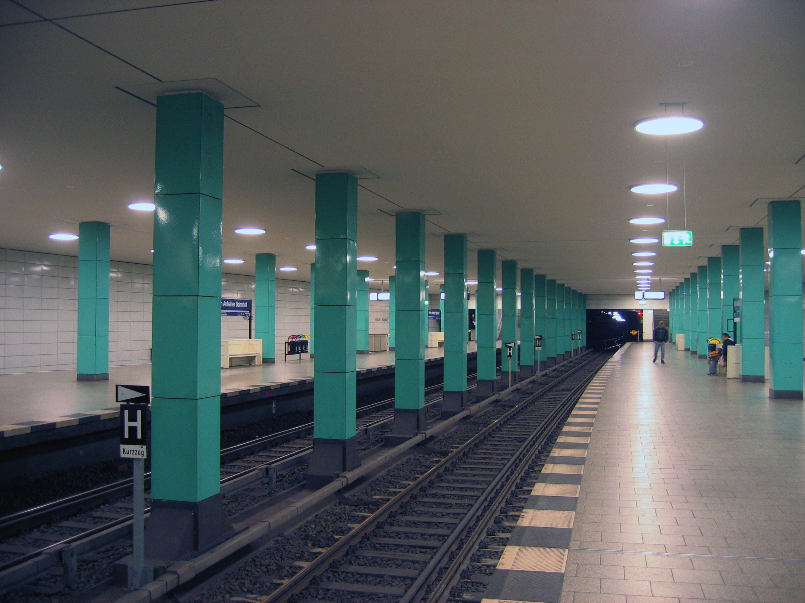 S-Bahnsteige des Anhalter Bahnhofs in Berlin